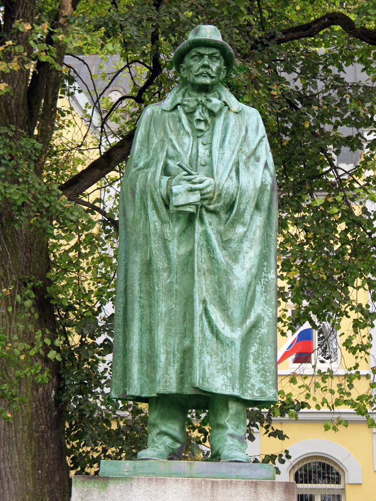 Bronzová plastika Pavla Orsagha Hviezdoslava v Dolnom Kubíne